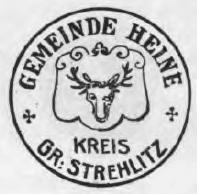 Altes Siegel bzw. Stempel des Ortes Heine im Kreis Groß Strehlitz, Schlesien.